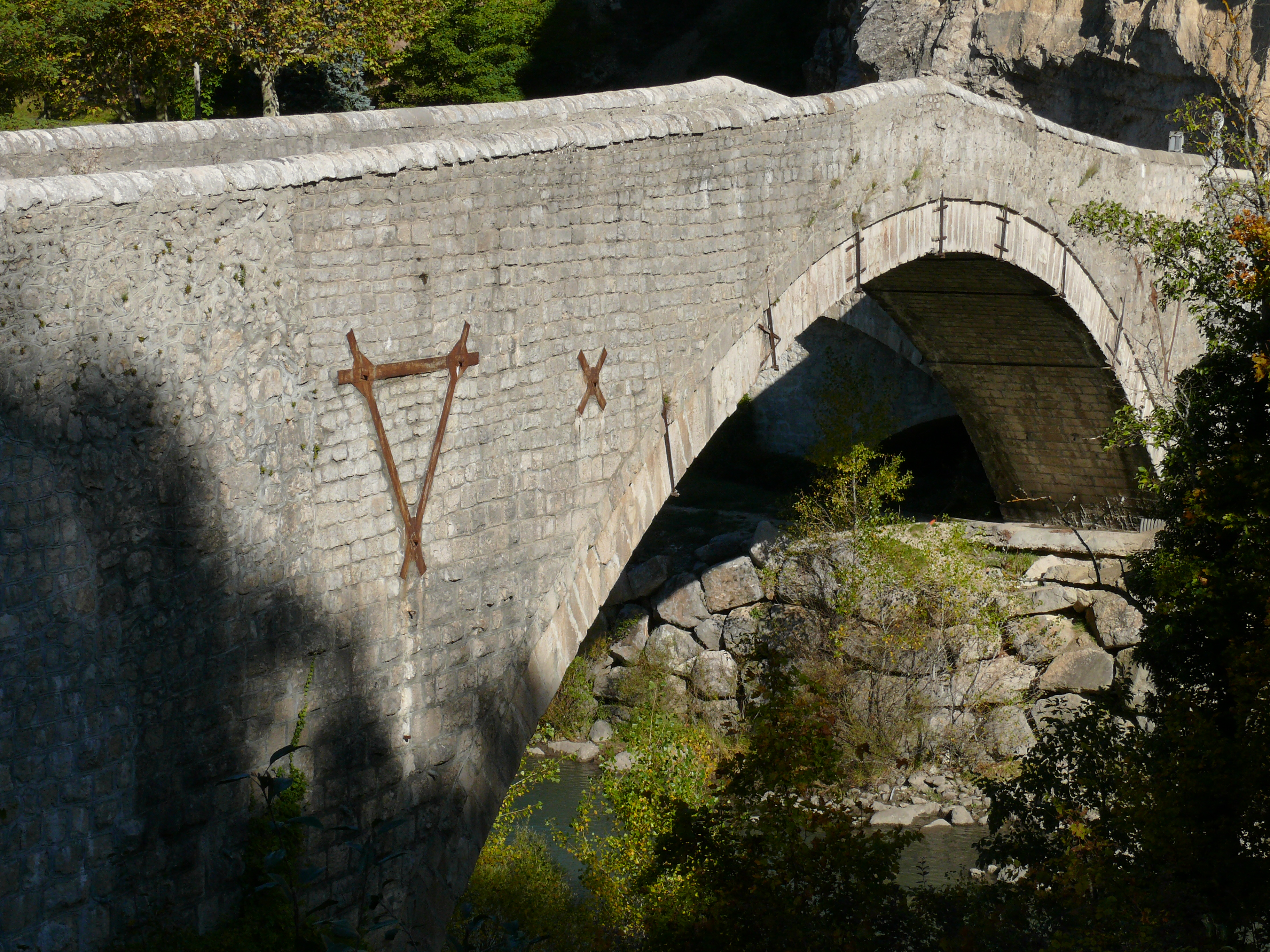 Castellane - Pont du Roc vu de l'amont